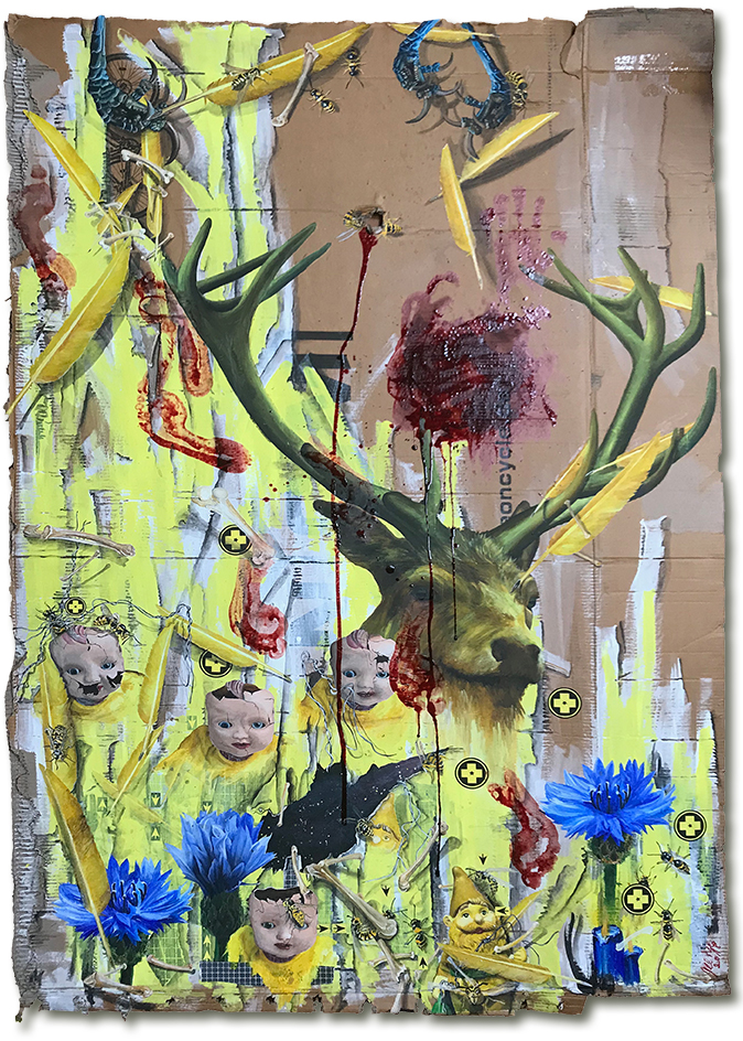 Speaking in Tongues (Totem & Taboo VI) 02/2018, 185 x 124 cm, Mischtechnik (Collage, Acrylfarbe & Blut) auf Wellpappe